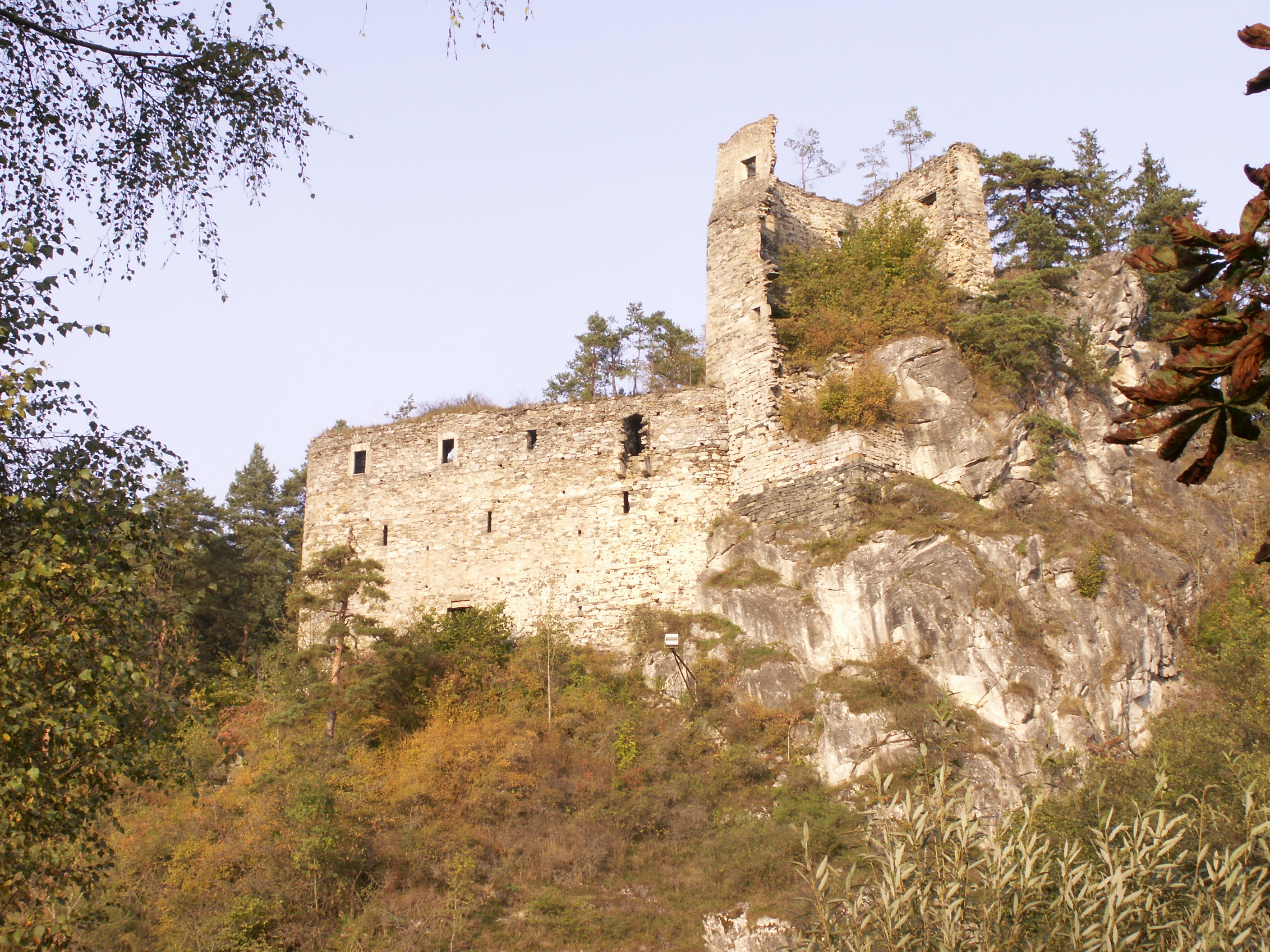 zřícenina hradu Eibenstein (Rakousko)